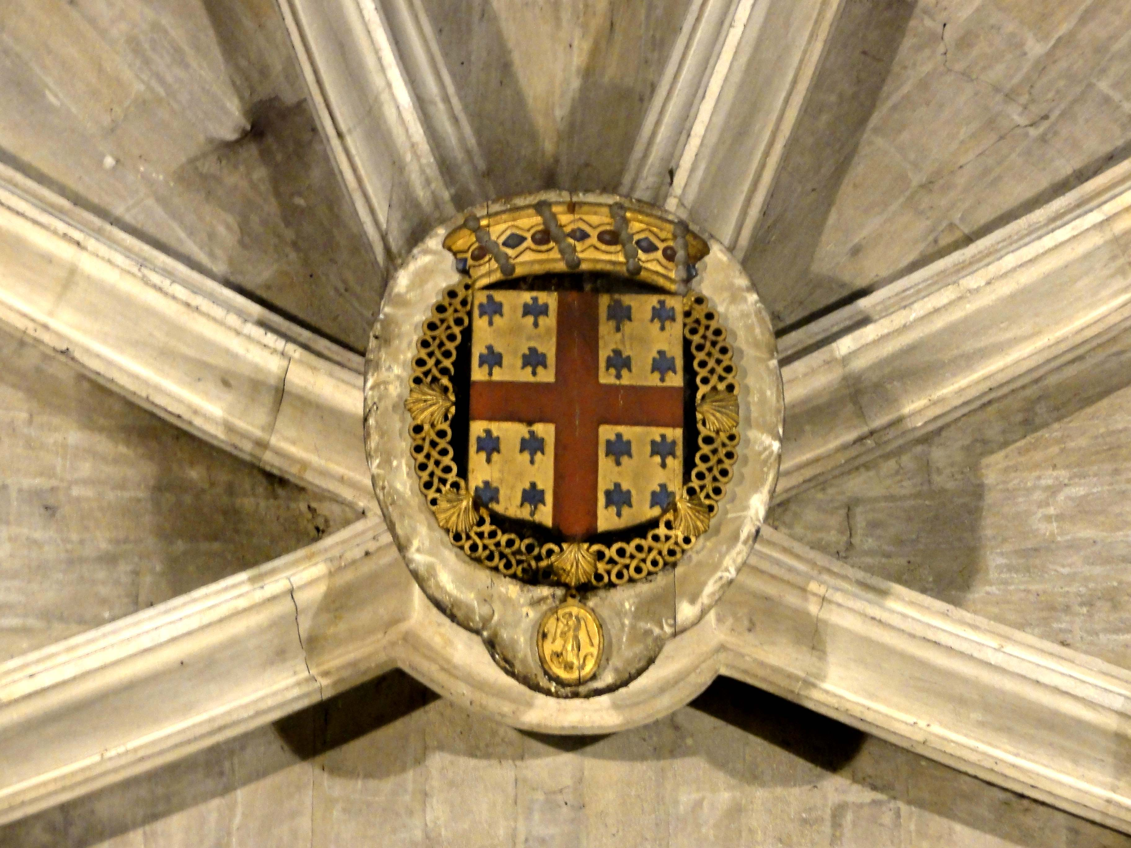 Intérieur de l'église - voir titre.